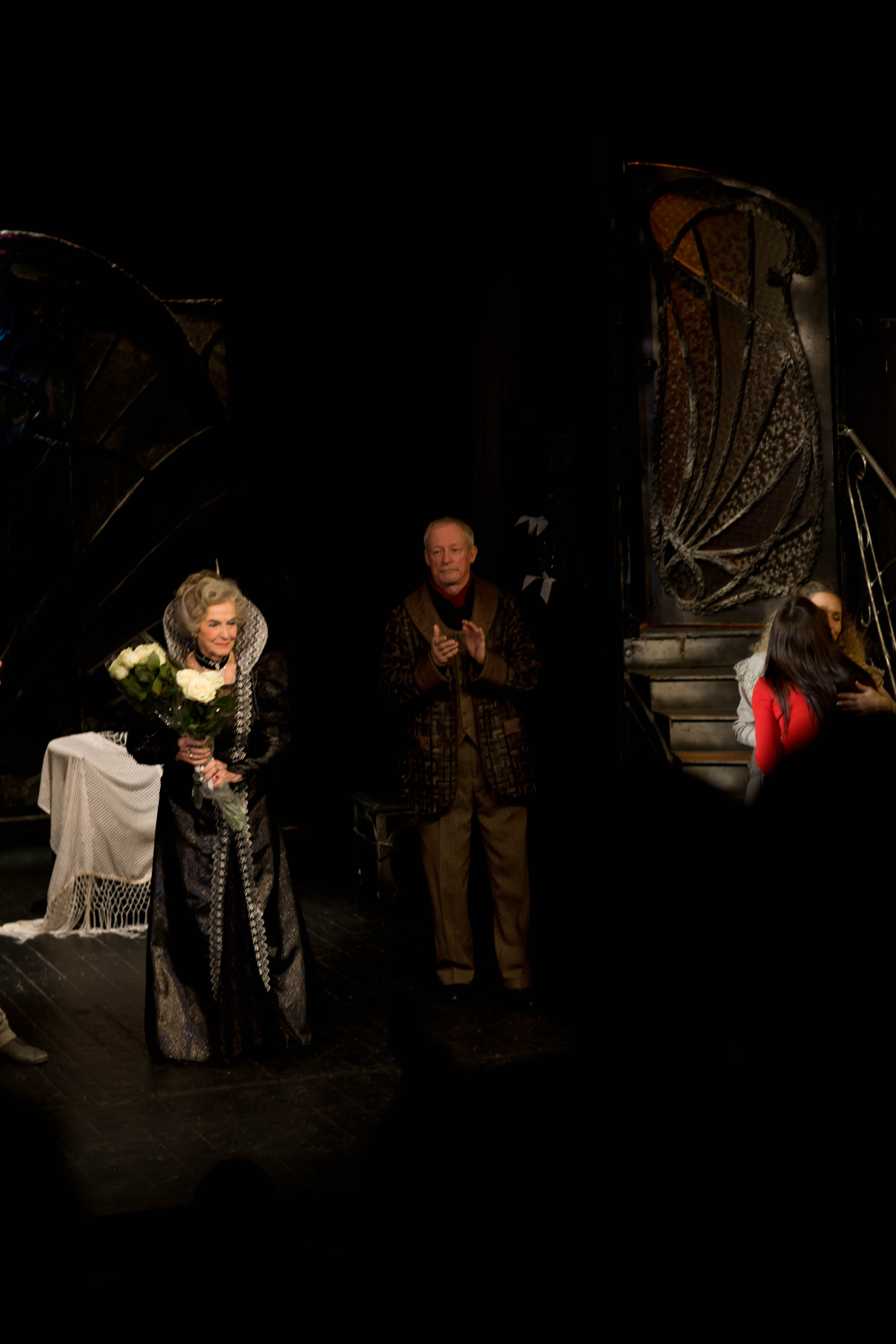 Спектакль "Деревья умирают стоя" в театре-фестивале "Балтийский дом" (Санкт-Петербург)